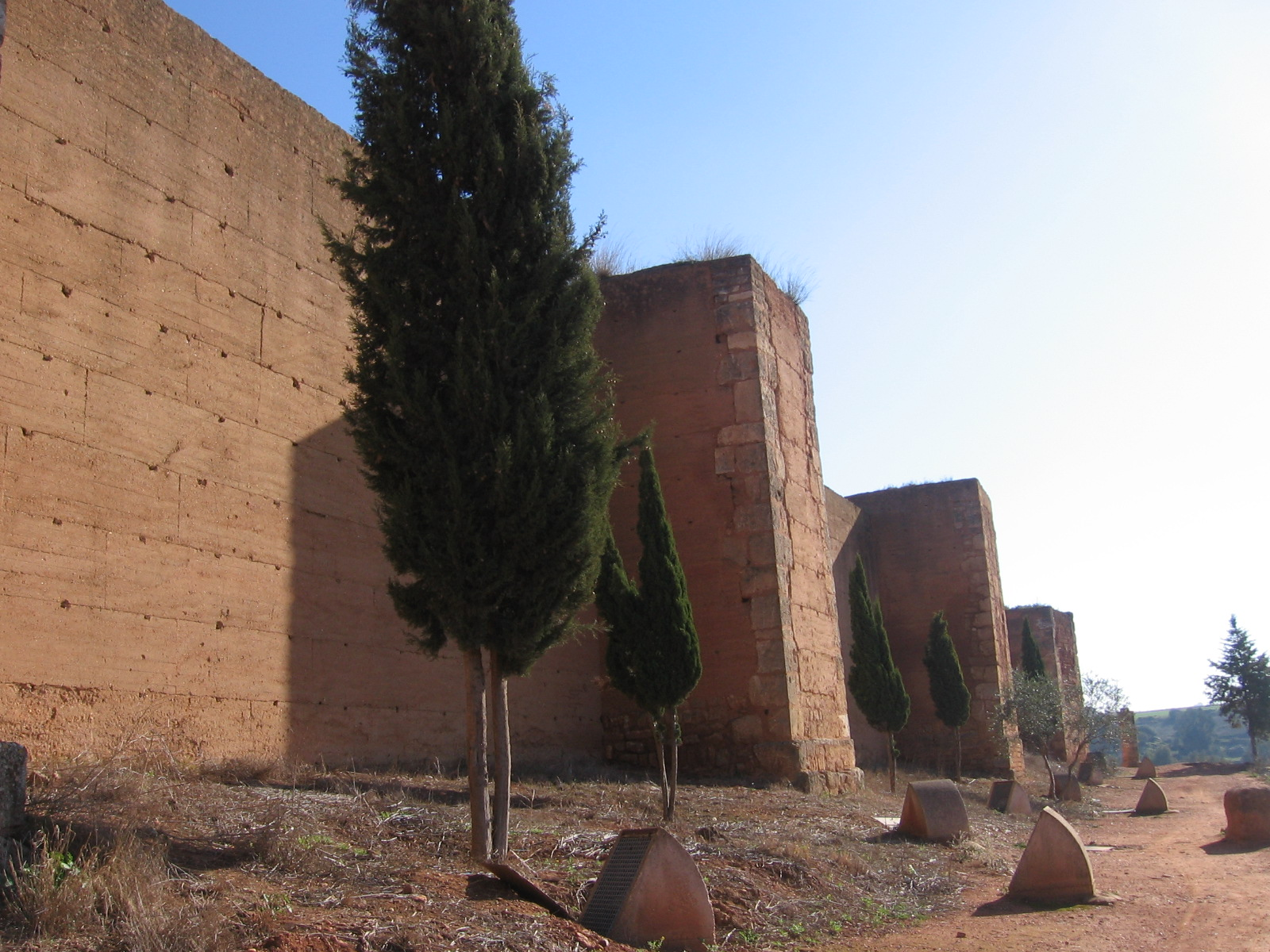 Muralhas, Niebla, Huelva, Espanha